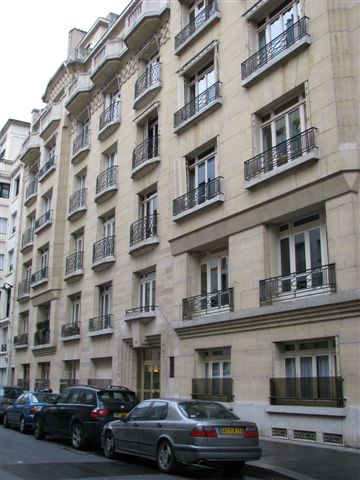 Paris, 174 rue de l'Universite; Kajetan Morawski's home